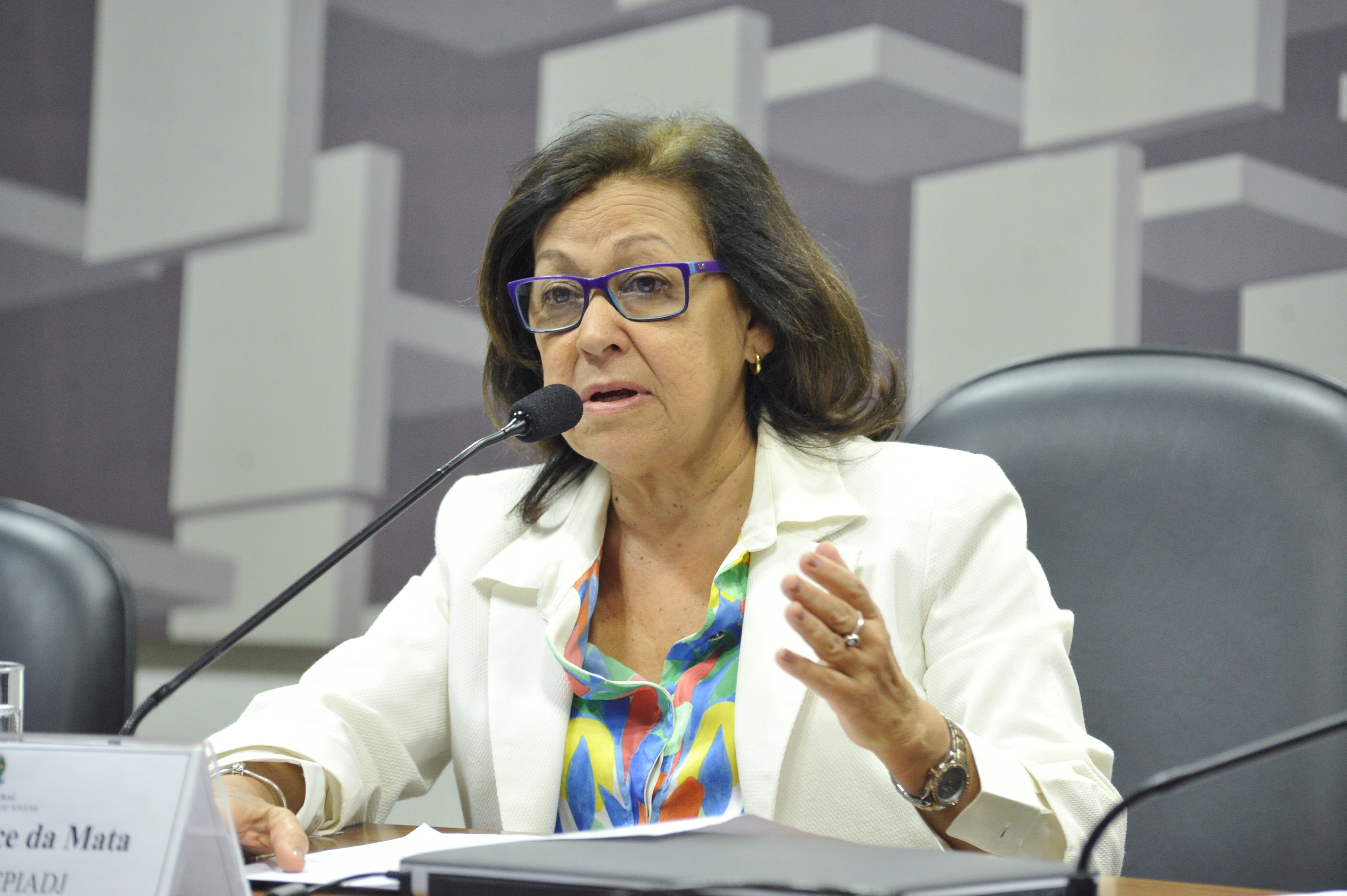 CPI do Assassinato de Jovens realiza reunião deliberativa para análise de requerimentos. à mesa, presidente da CPIADJ, senadora Lídice da Mata (PSB-BA). Foto: Geraldo Magela/Agência Senado